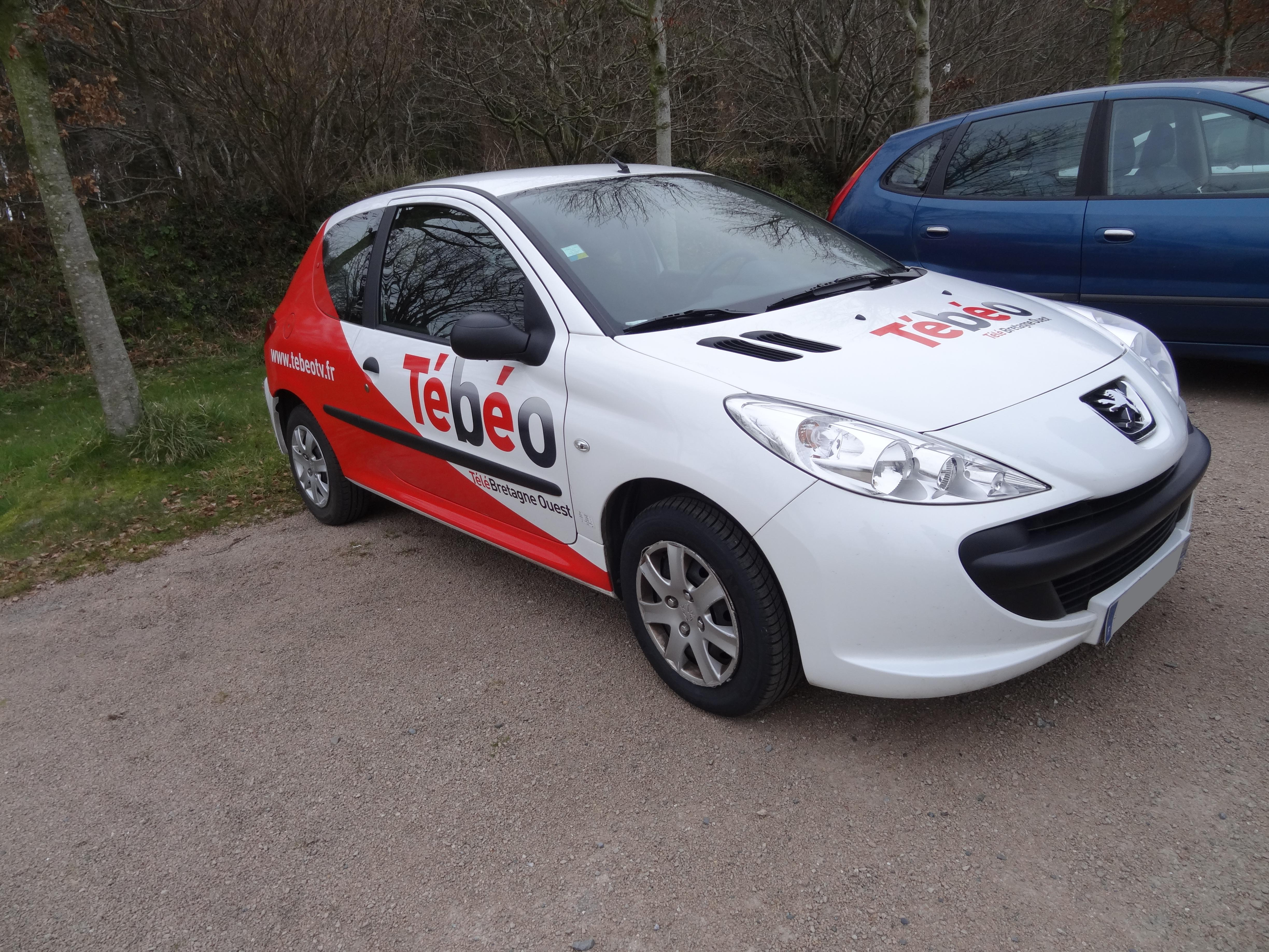 Véhicule de fonction de la chaine Tébéo